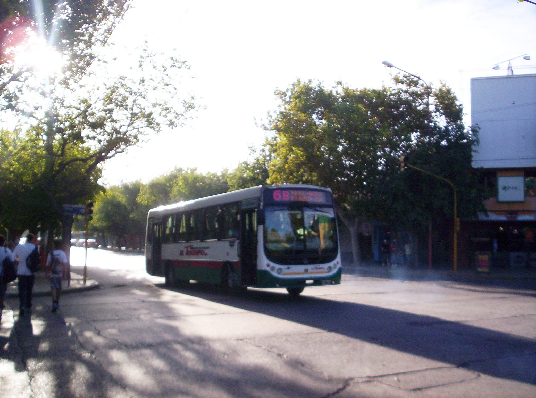 Vista del colectivo de la Línea 6, correspondiente al ramal "B", por las calles de la Ciudad de San Juan, Argentina